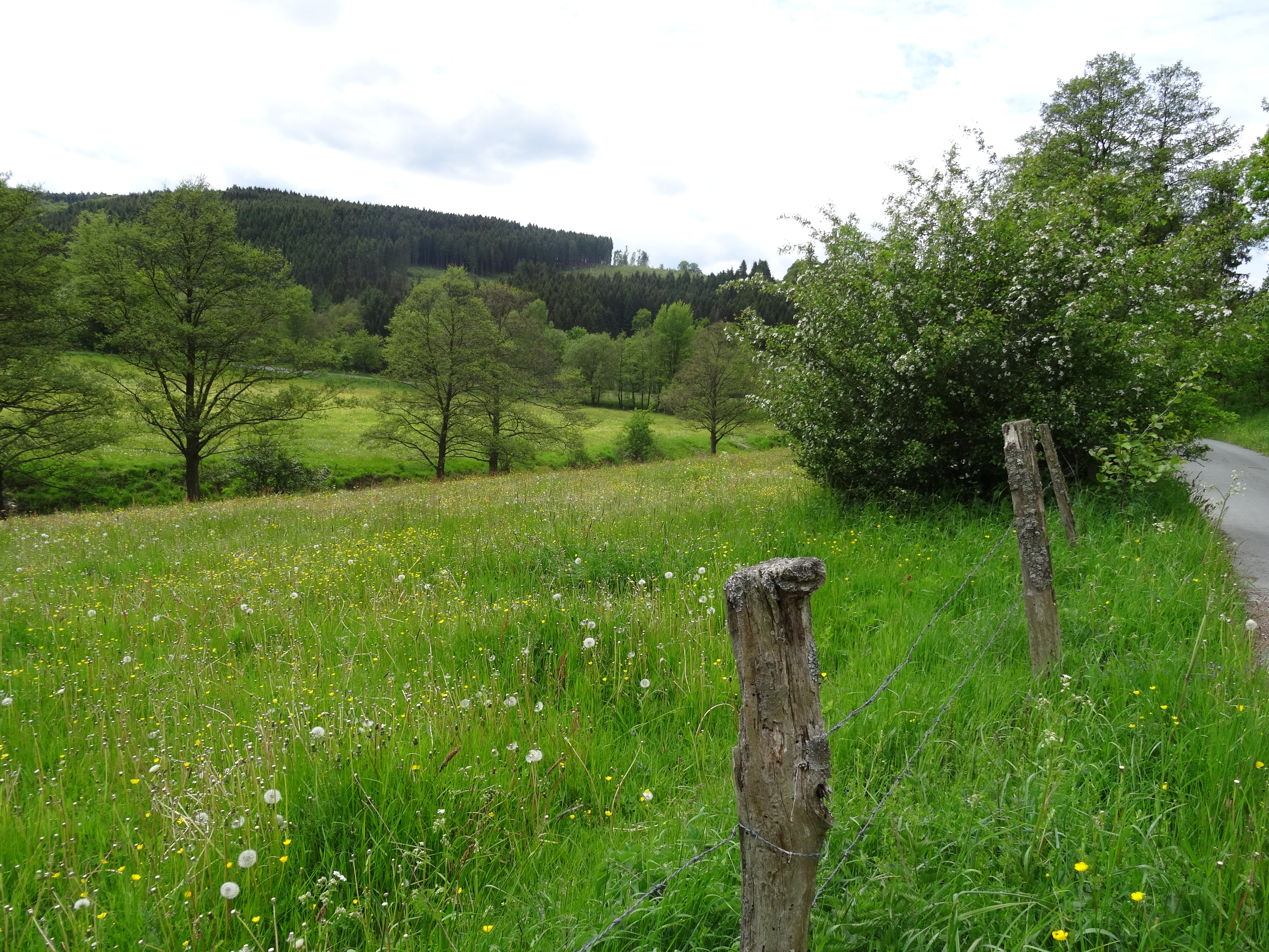 Tals des Medebachs südlich von Bruchhausen, Naturschutzgebiet „Medebachtal und Quellgebiet“ (NSG HSK-267) in Olsberg